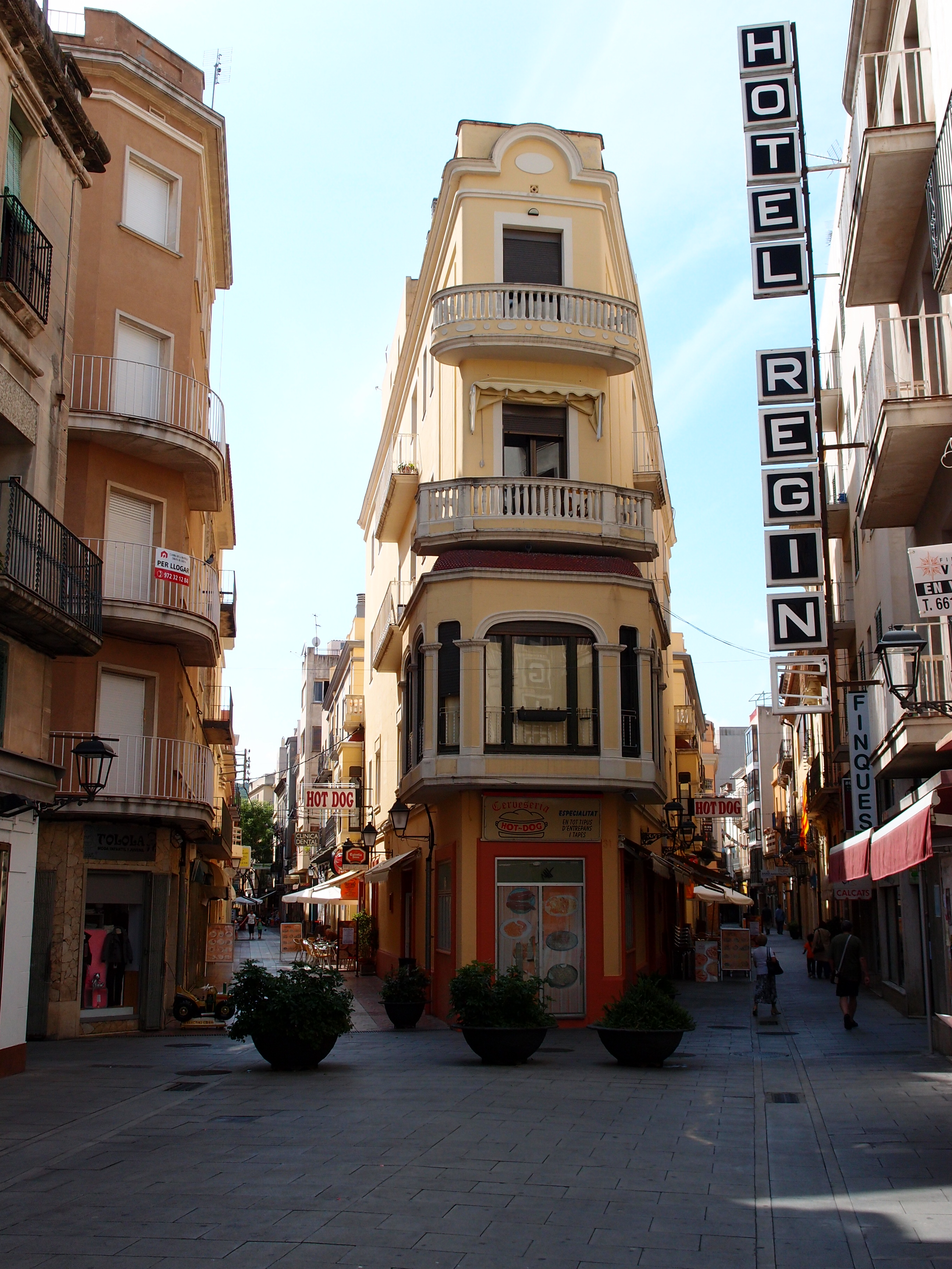 Sant Feliu de Guíxols - Gassen in der Ortsmitte Datum: 21.09.2011 Urheber: M. Pfeiffer alias Benutzer:Gordito1869 Quelle: privates Fotoarchiv des Urhebers